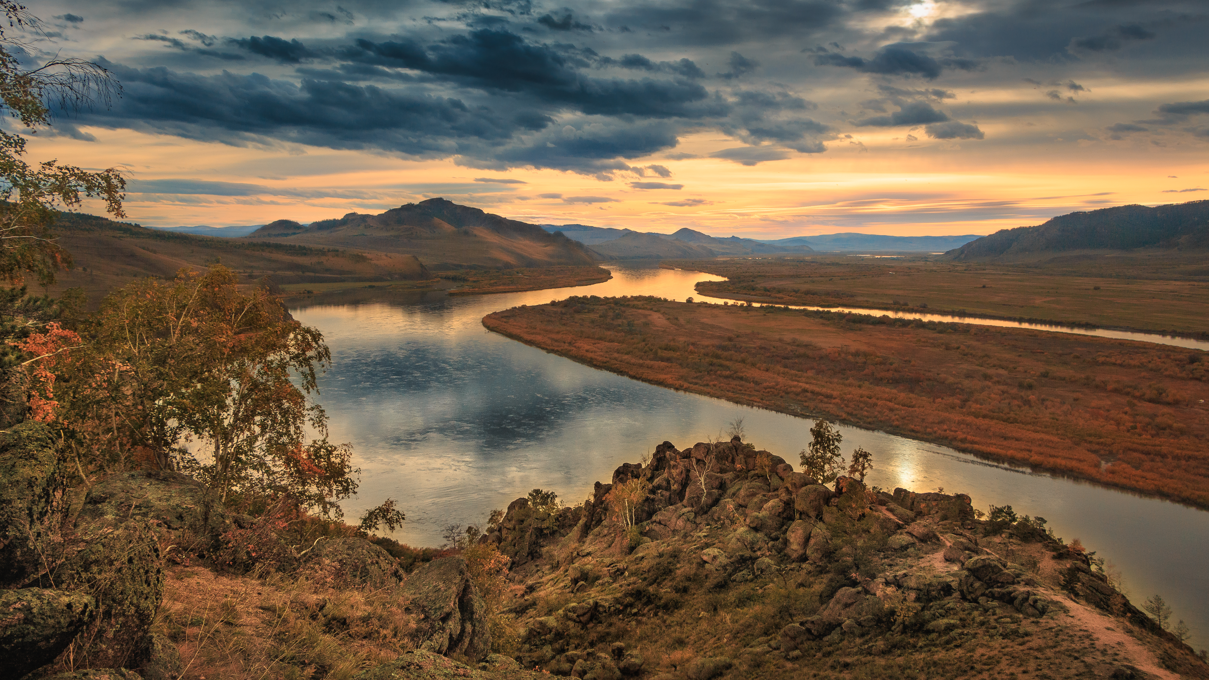 Скала Спящий Лев: район, Бурятия This image is related to the protected area of Russia number 0310276